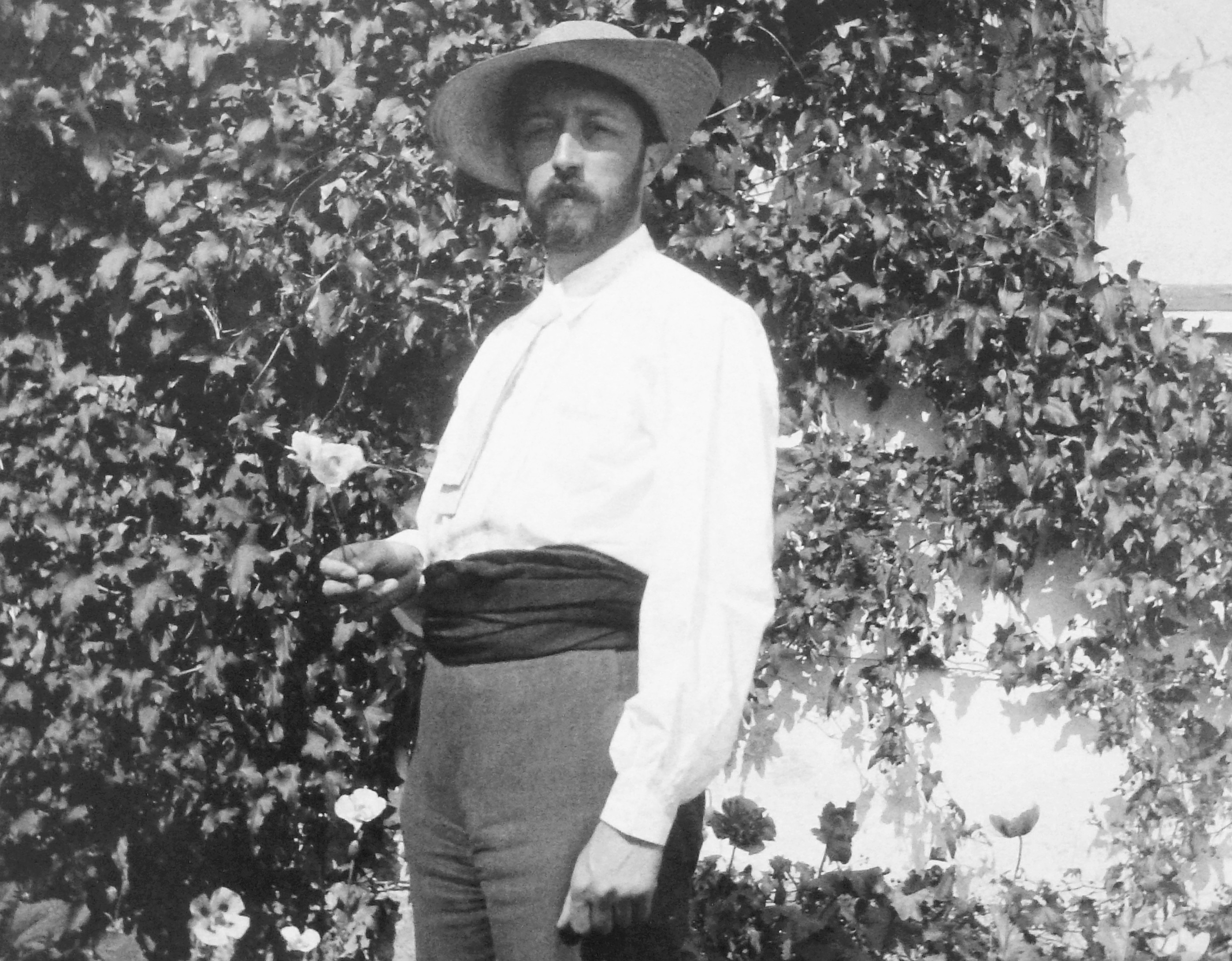 Prins Eugen av Sverige på "Lilla Tyresö"